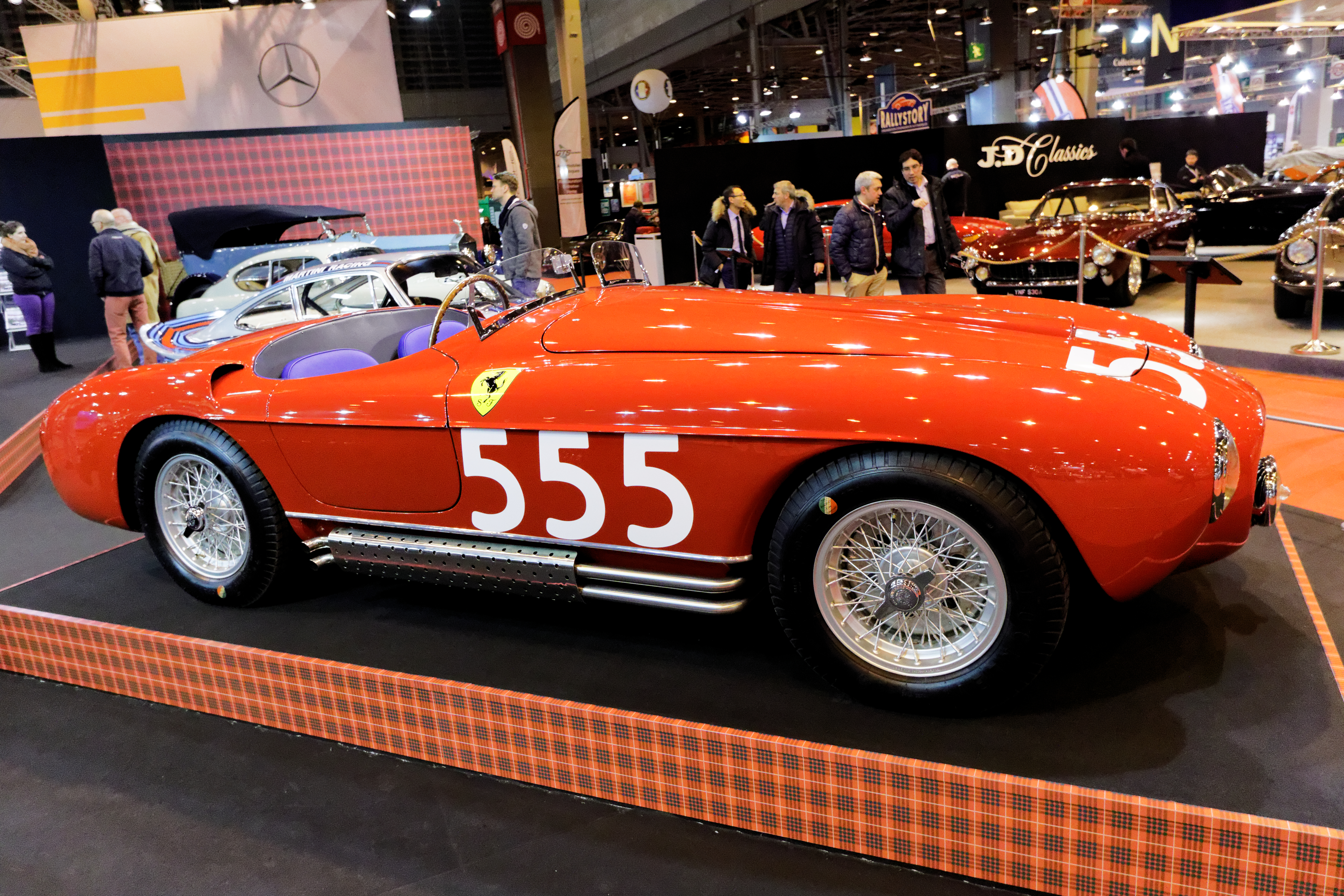 Une des voiture présentée lors du salon Rétromobile de Paris 2015